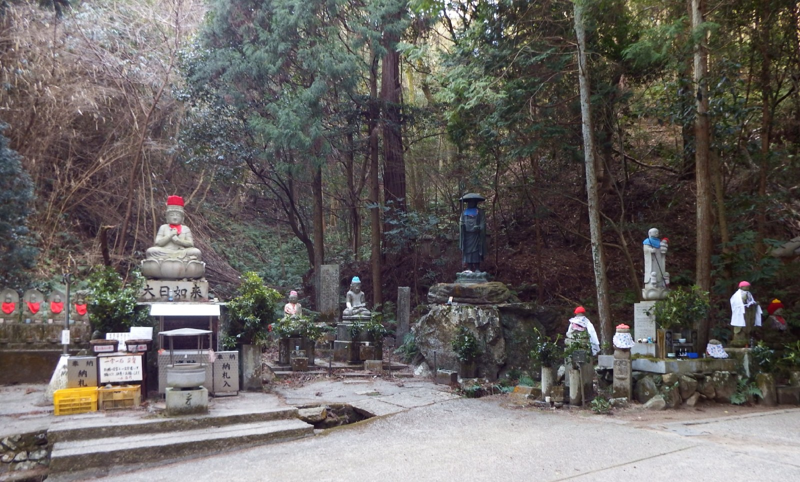 太山寺の石仏群